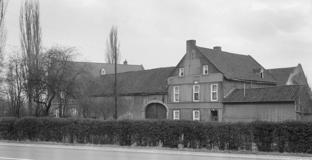 Heer-Maastricht: Hoeve de Croon aan de Rijksweg, ooit onderdeel van het landgoed Huis Eyll.